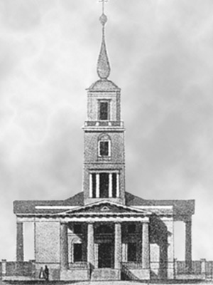 Шпиль не сохранился